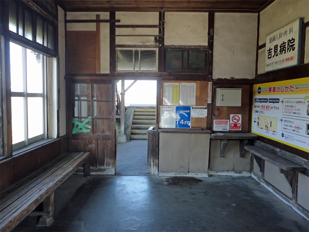 富山地方鉄道本線浜加積駅駅舎内